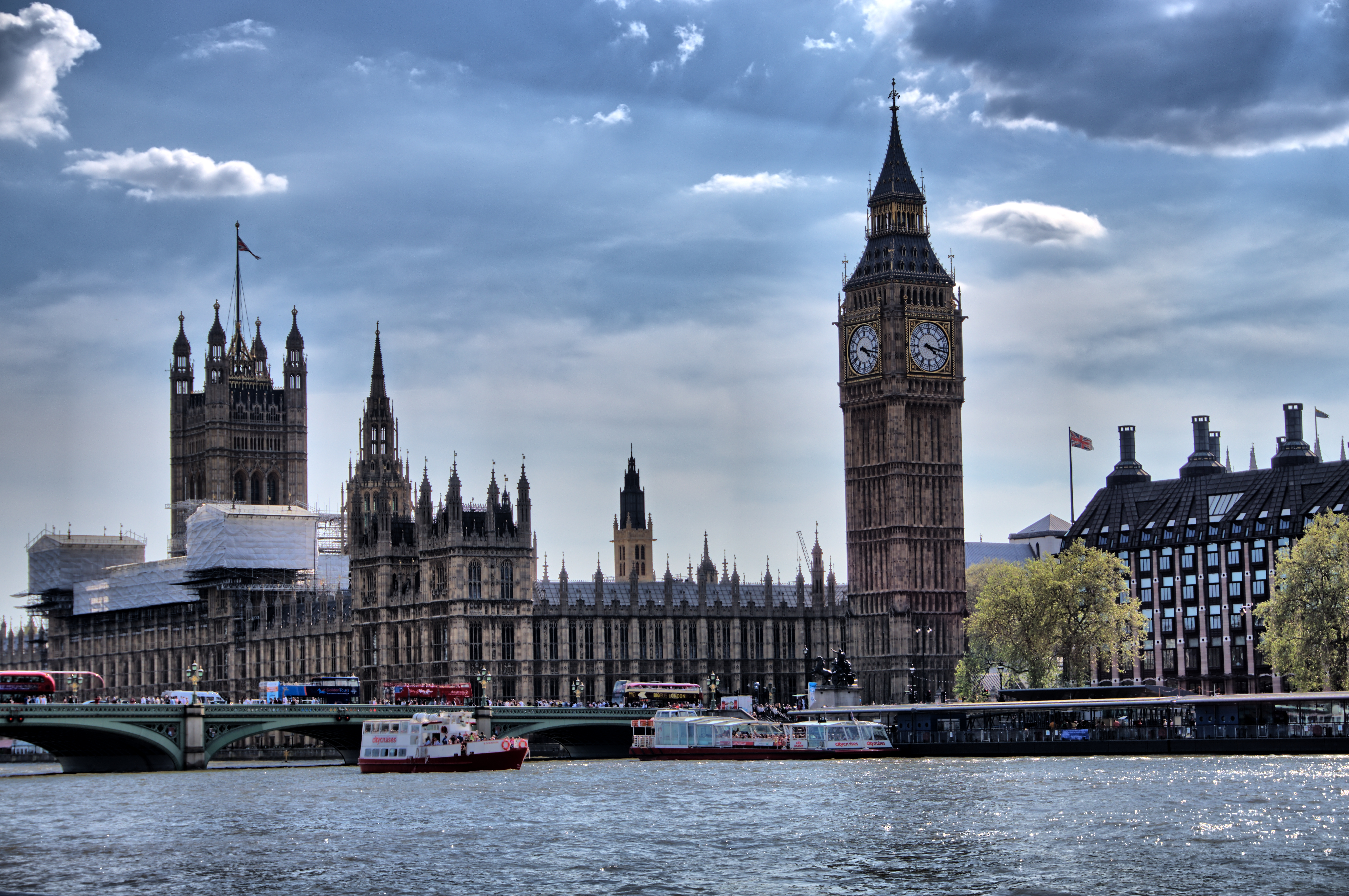 London-BigBen